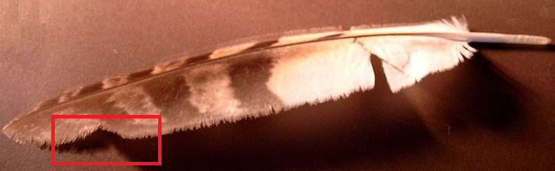 Một khía lông trên lông bay được thể hiện